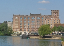 Moulin historique du groupe Soufflet